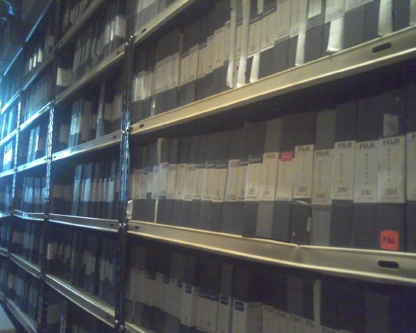 Seis mil Betacam con material desde 1994 hasta 2007. Archivo DiFilm, Florencio Varela.